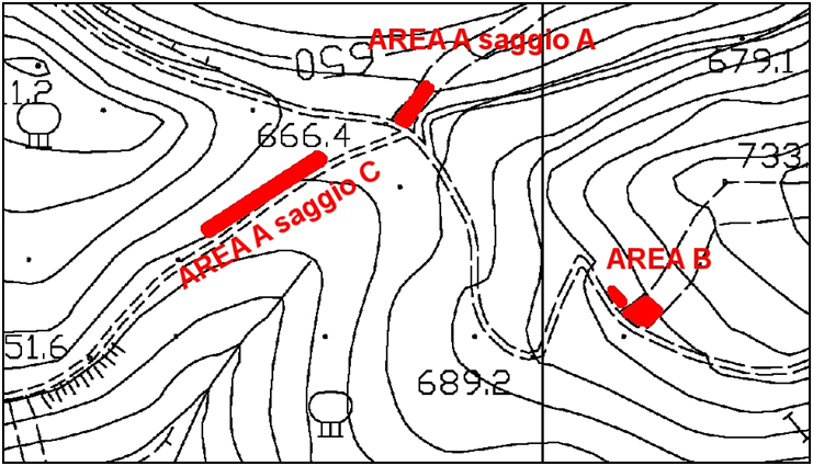 pianta e saggi